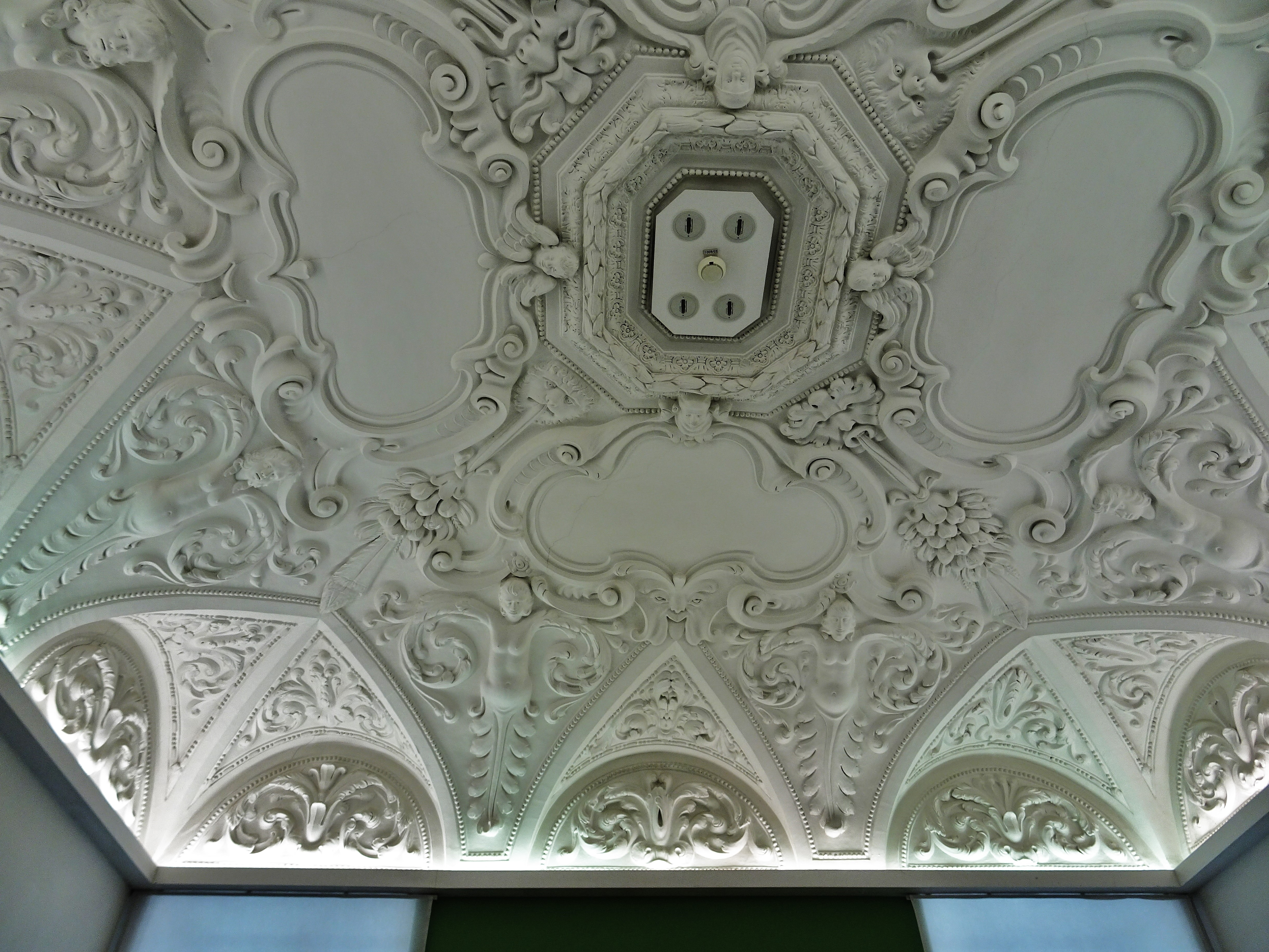 Burg (Klagenfurt am Wörthersee), barocke Stuckdecke